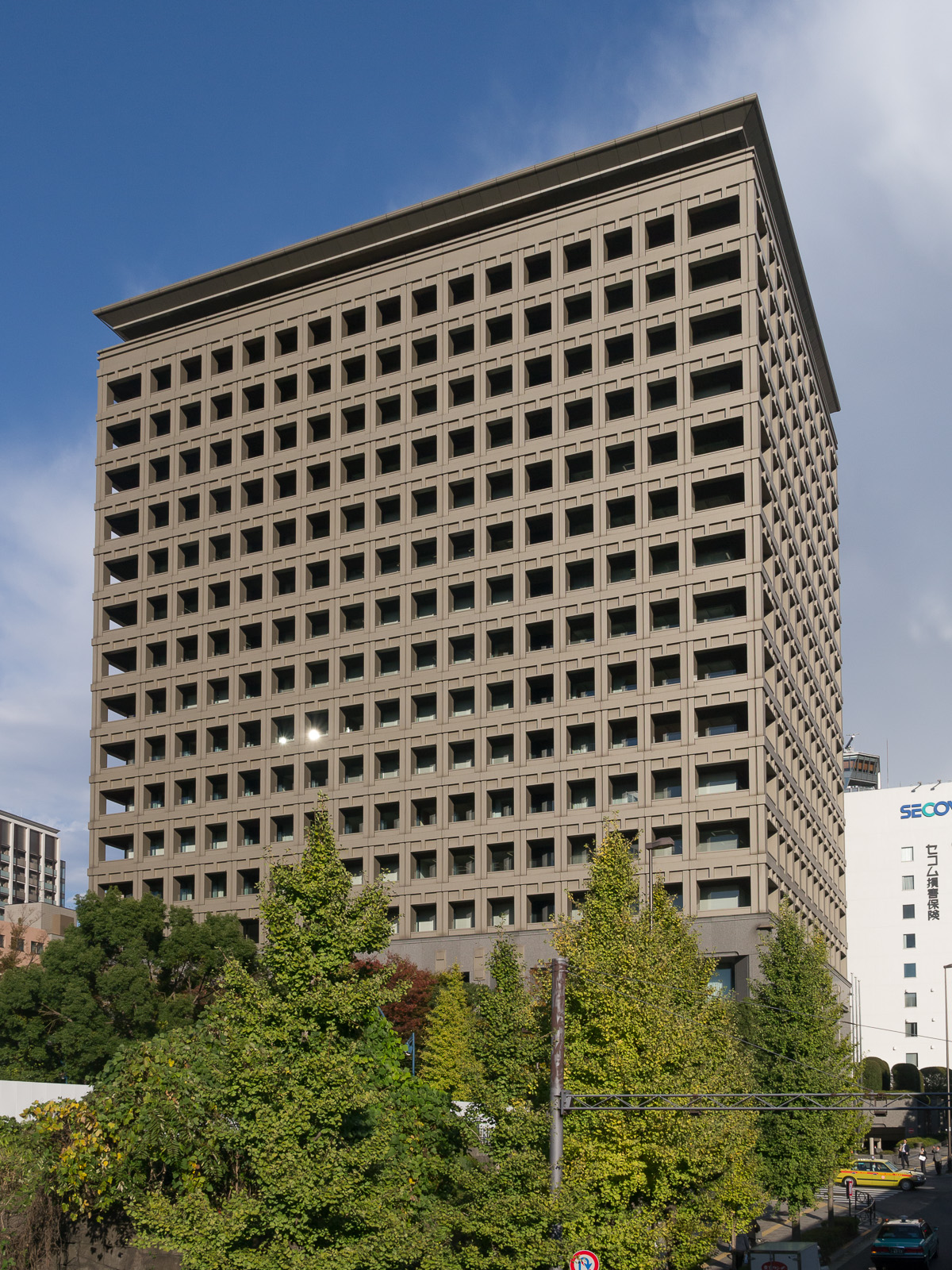 都道府県会館、東京都千代田区平河町2-6-3。